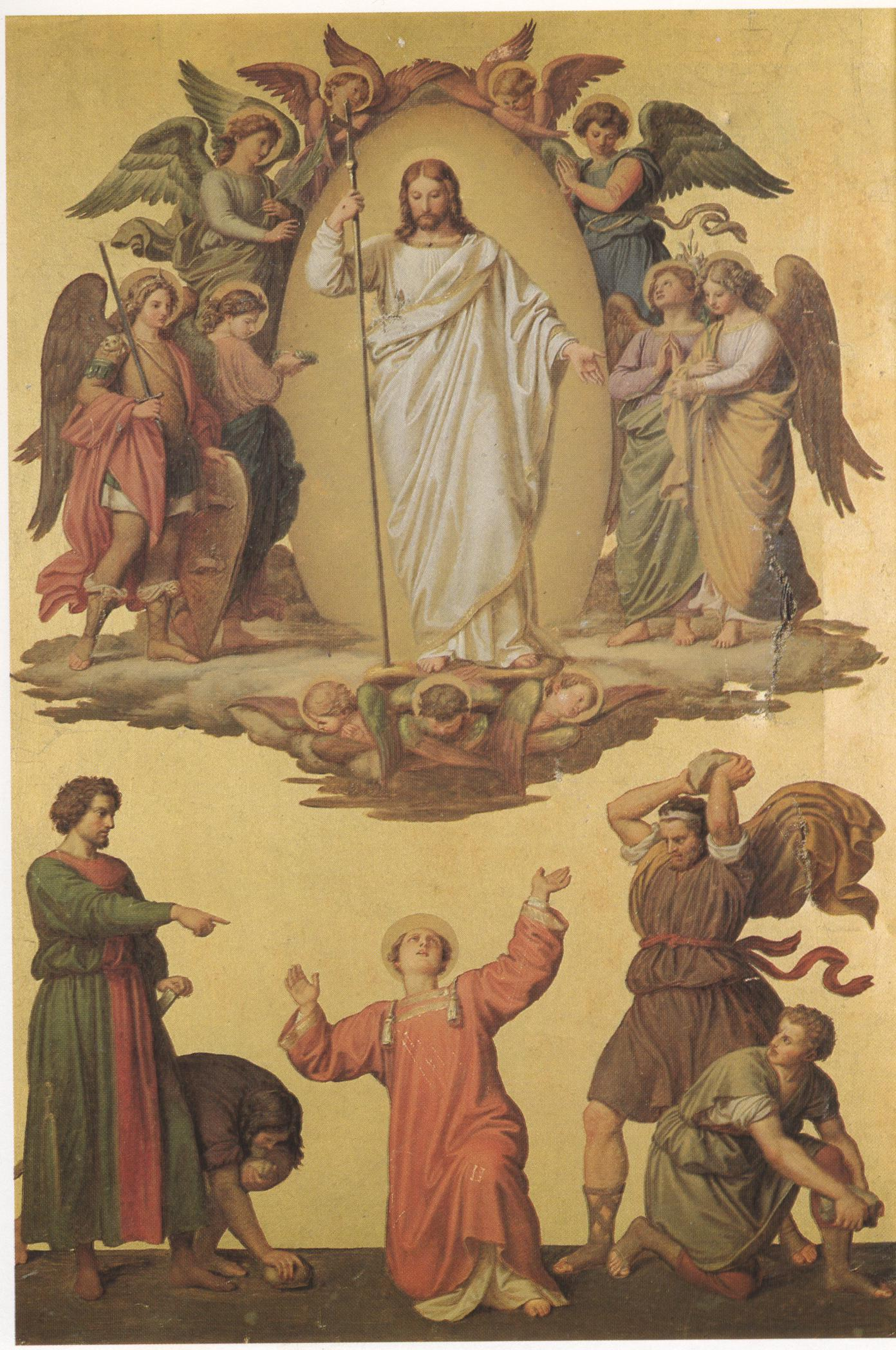 Johann von Schraudolph, Steinigung des Stephanus, Speyer, Dom. Die Person links, mit grünem Mantel (Saulus), trägt die Gesichtszüge des Auftraggebers, König Ludwig I. von Bayern